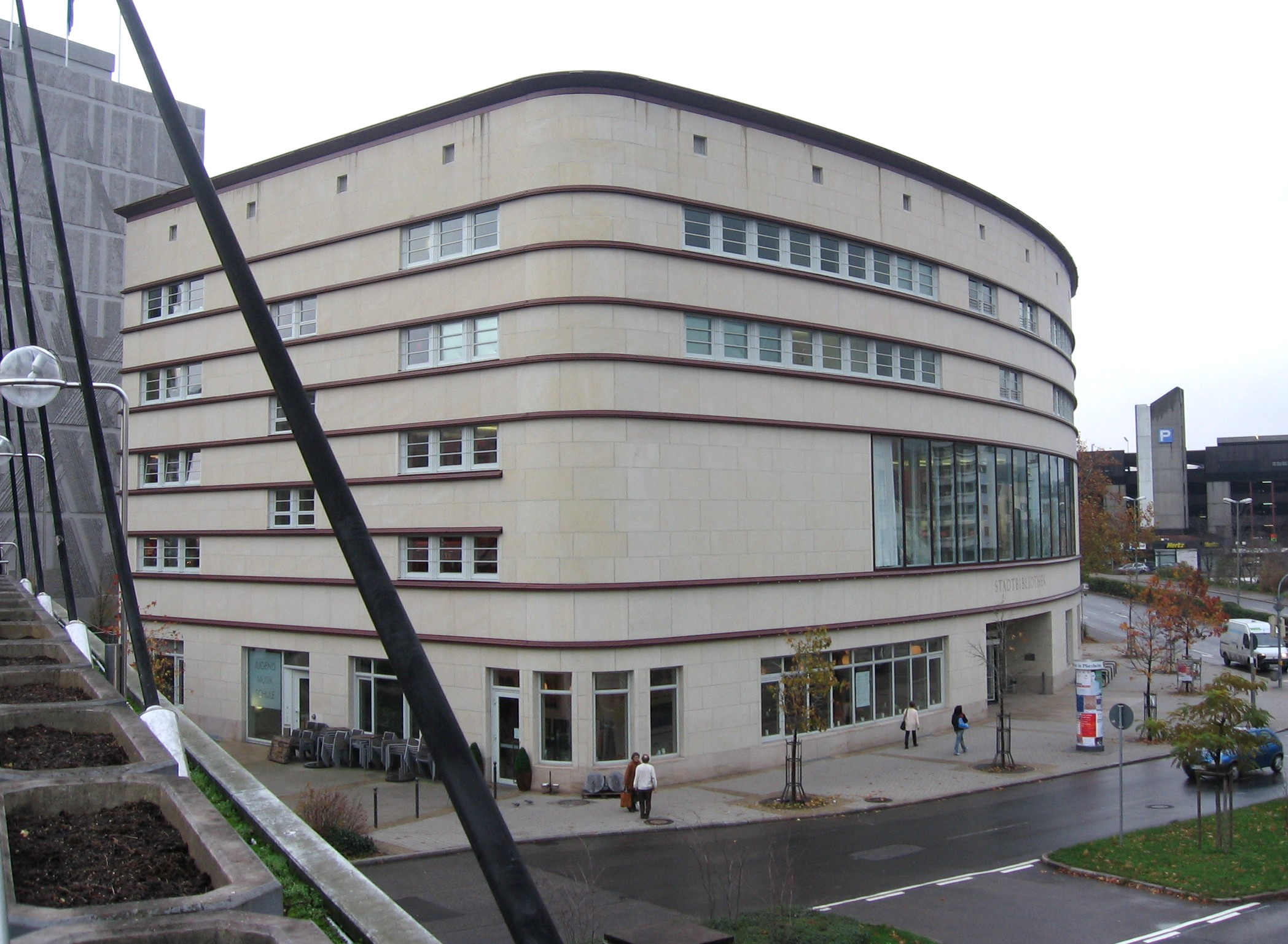 Pforzheim - Stadtbibliothek